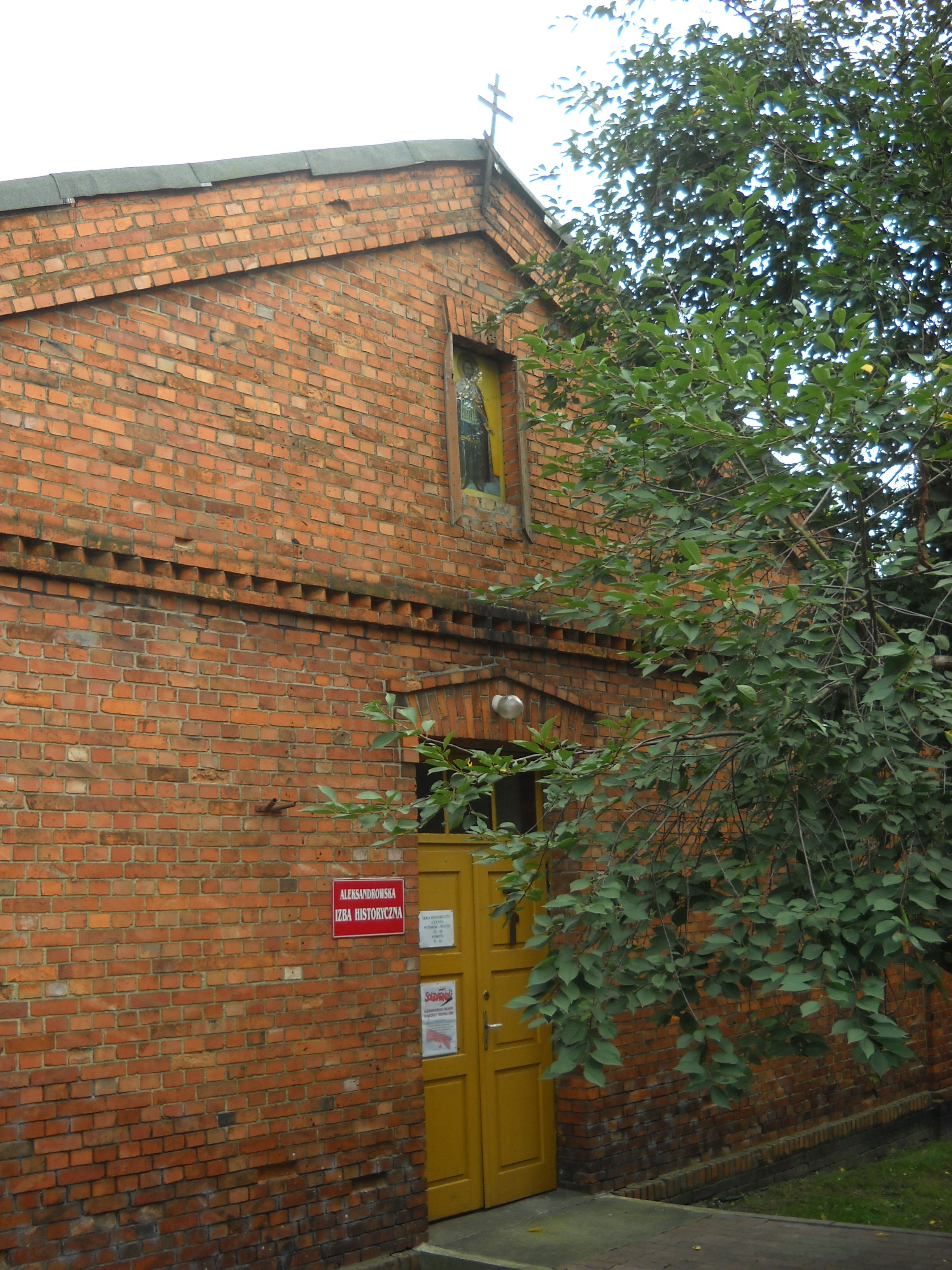 Prawosławna kaplica św. Aleksandra Newskiego w Aleksandrowie Kujawskim